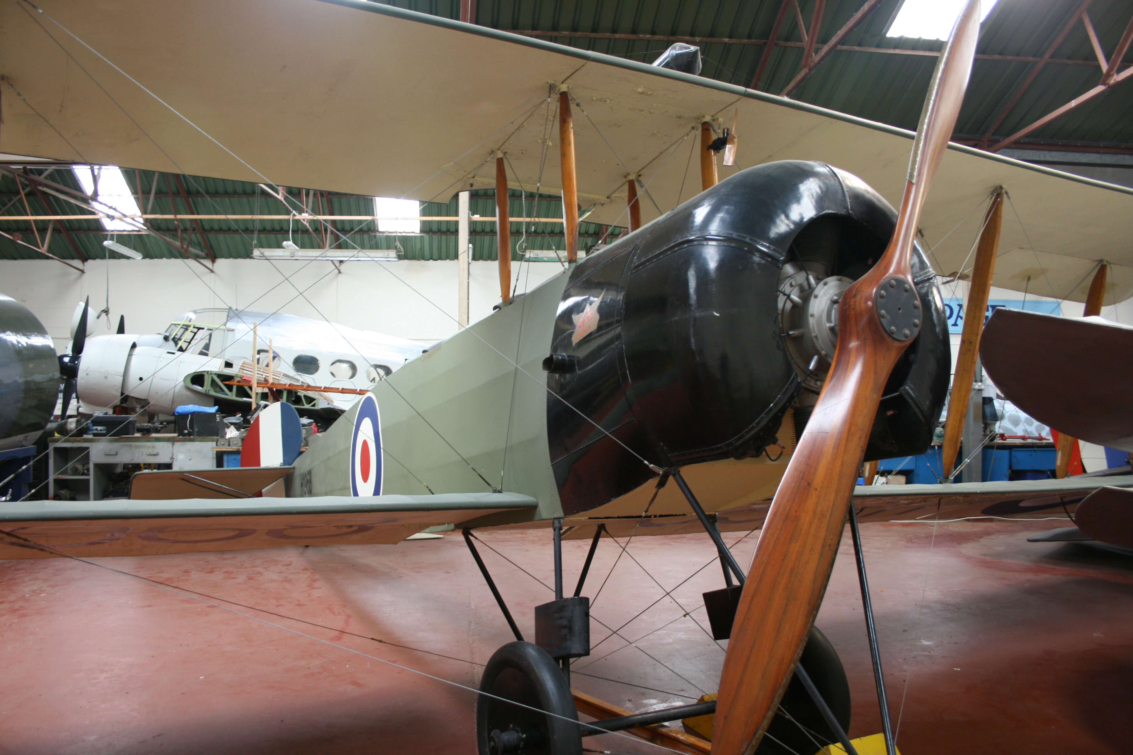 Avro 504 replica